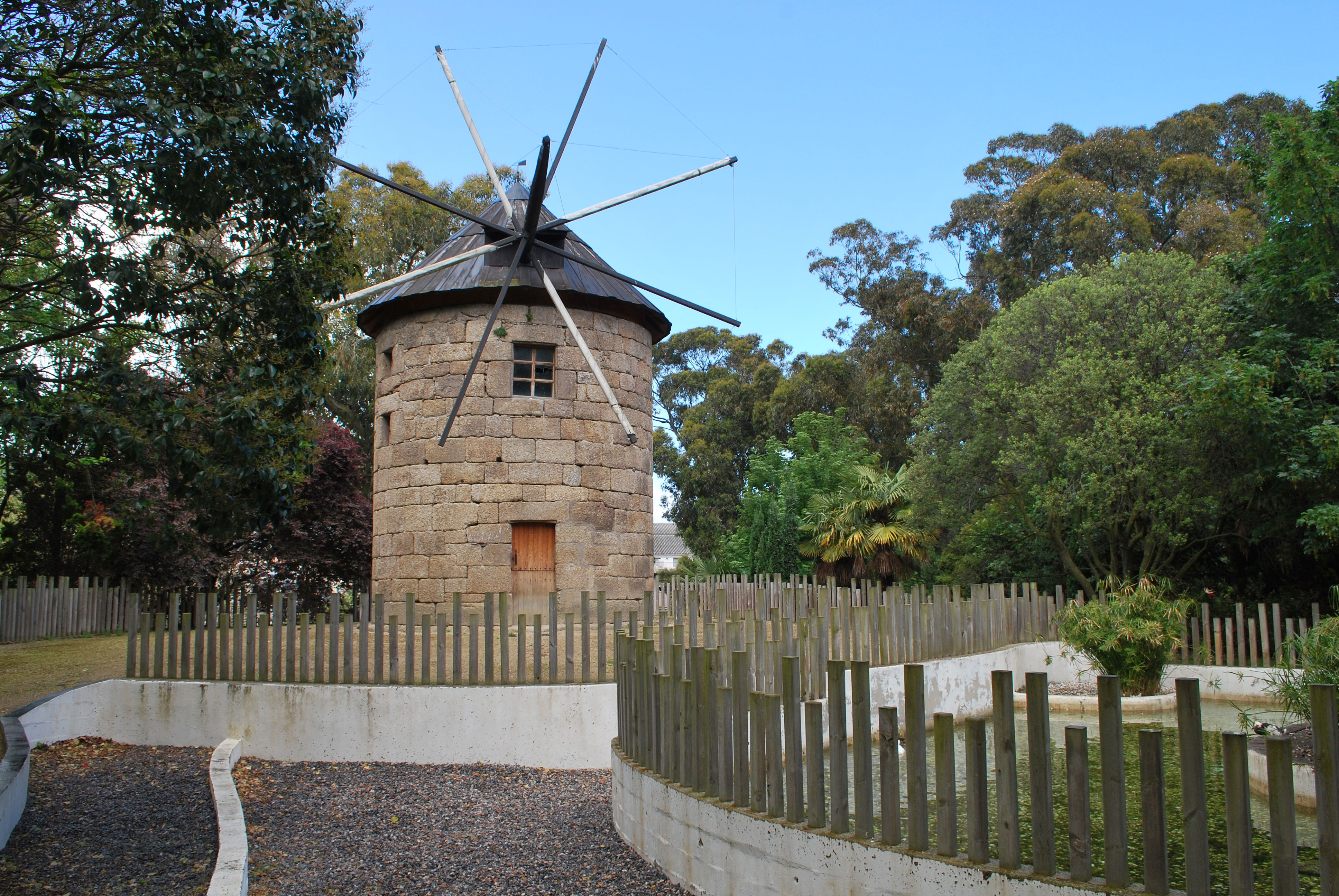 Vista do muiño do parque de santa margarida a coruña galiza spain